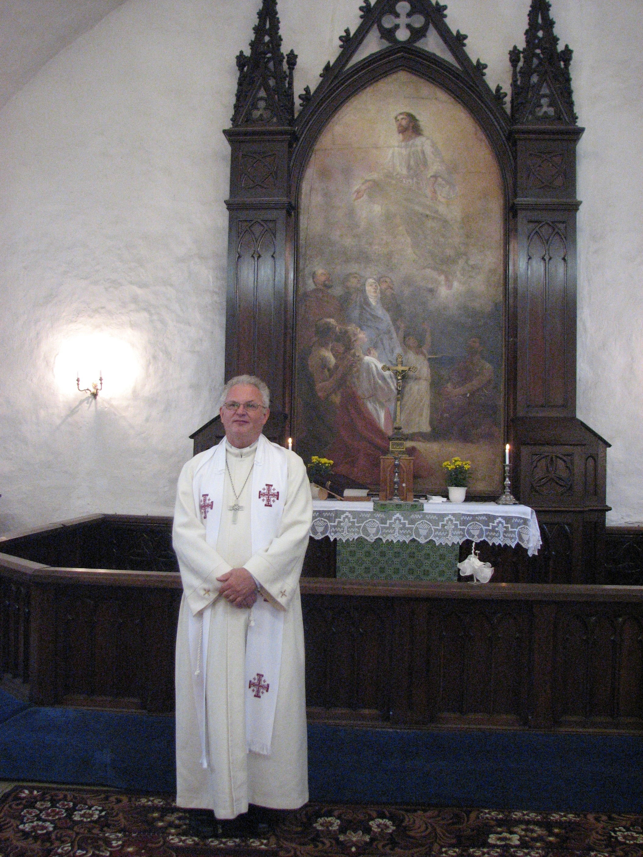 Jõhvi Mihkli koguduse õpetaja